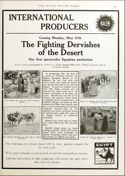 Advertising published in The Moving Picture World, Vol 12 p 545